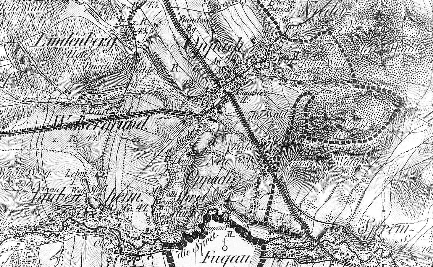 Original image description from the Deutsche Fotothek Oppach. Oberreit, Sect. Stolpen, 1821/22